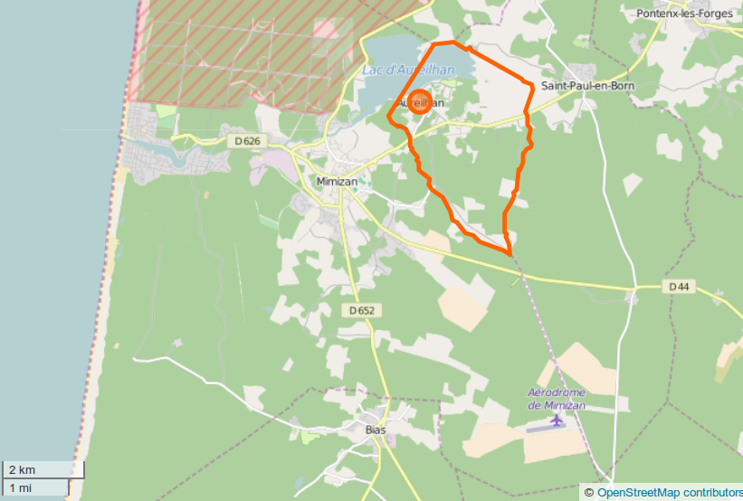 Aureilhan (Landes) ː Limites communales. This map may be incomplete, and may contain errors. Don't rely solely on it for navigation.